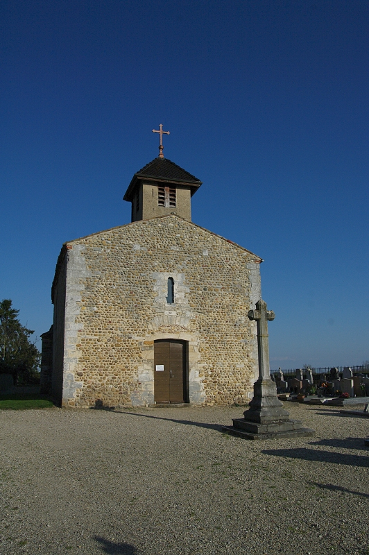 Église de Sainte-Olive dans l'Ain, construite en galets.